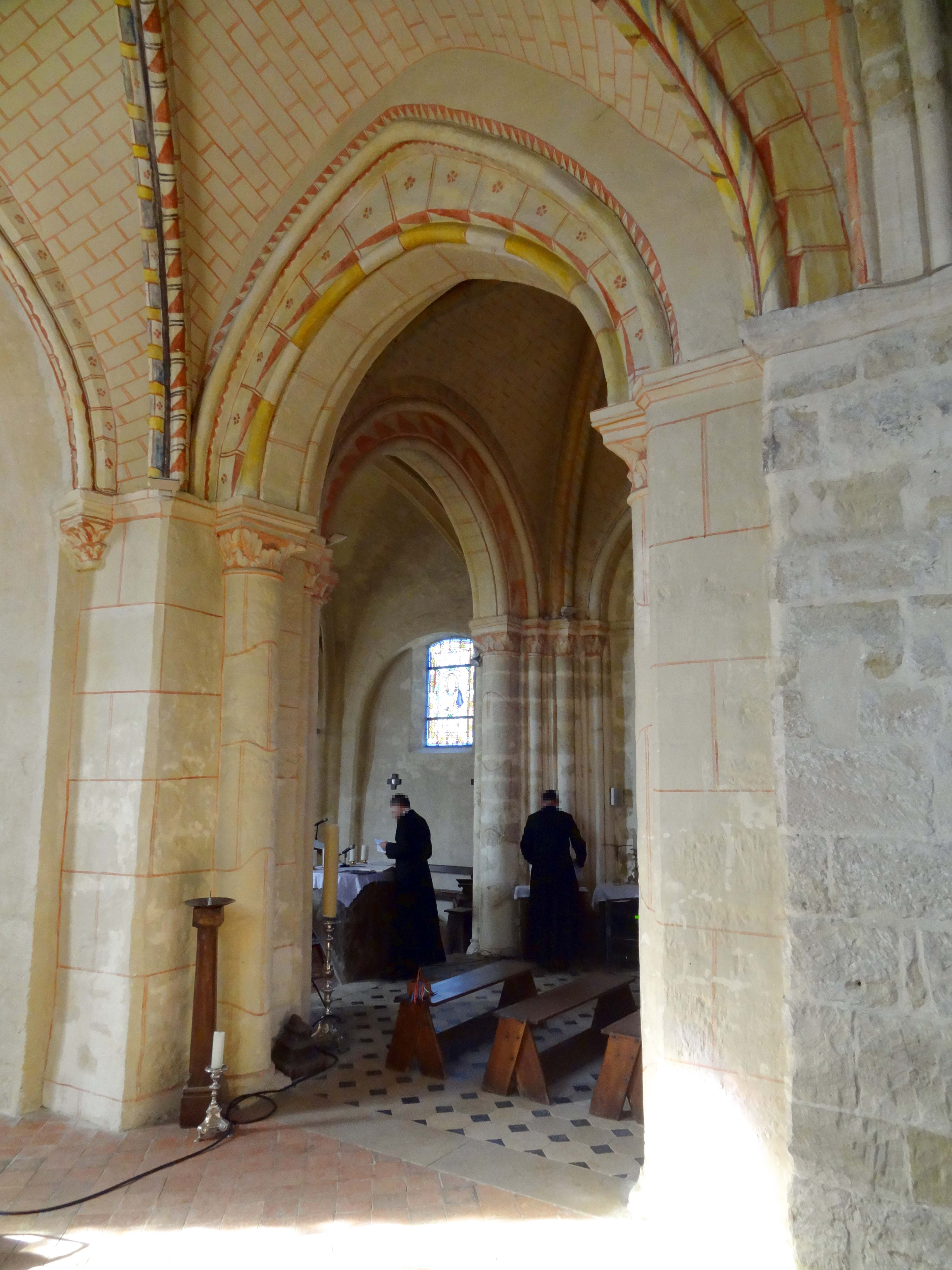 Intérieur de l'église - voir titre.